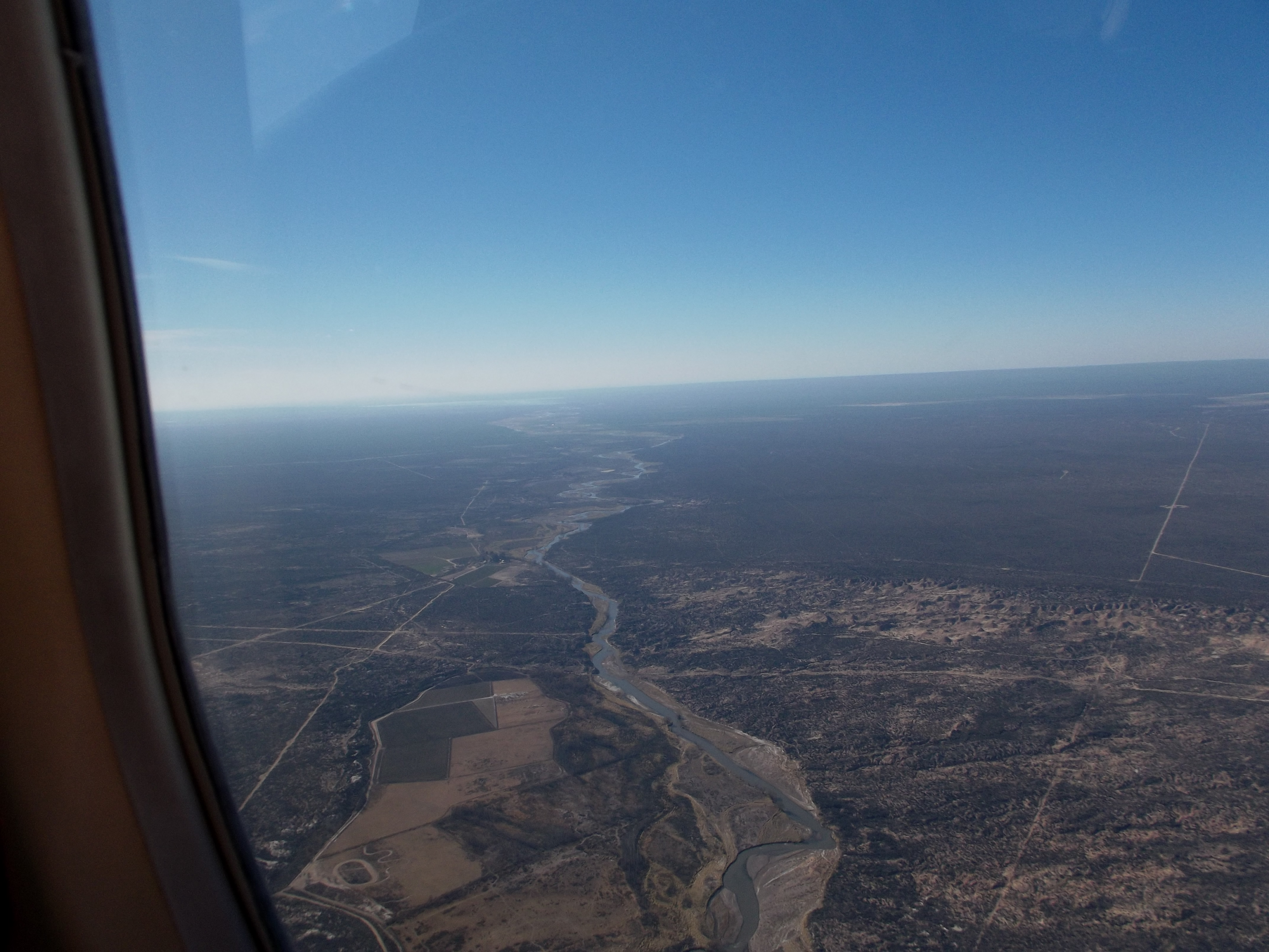 Rio Tunuyan visto desde el aire. Al fondo de la imagen puede observarse el Dique El Carrizal.